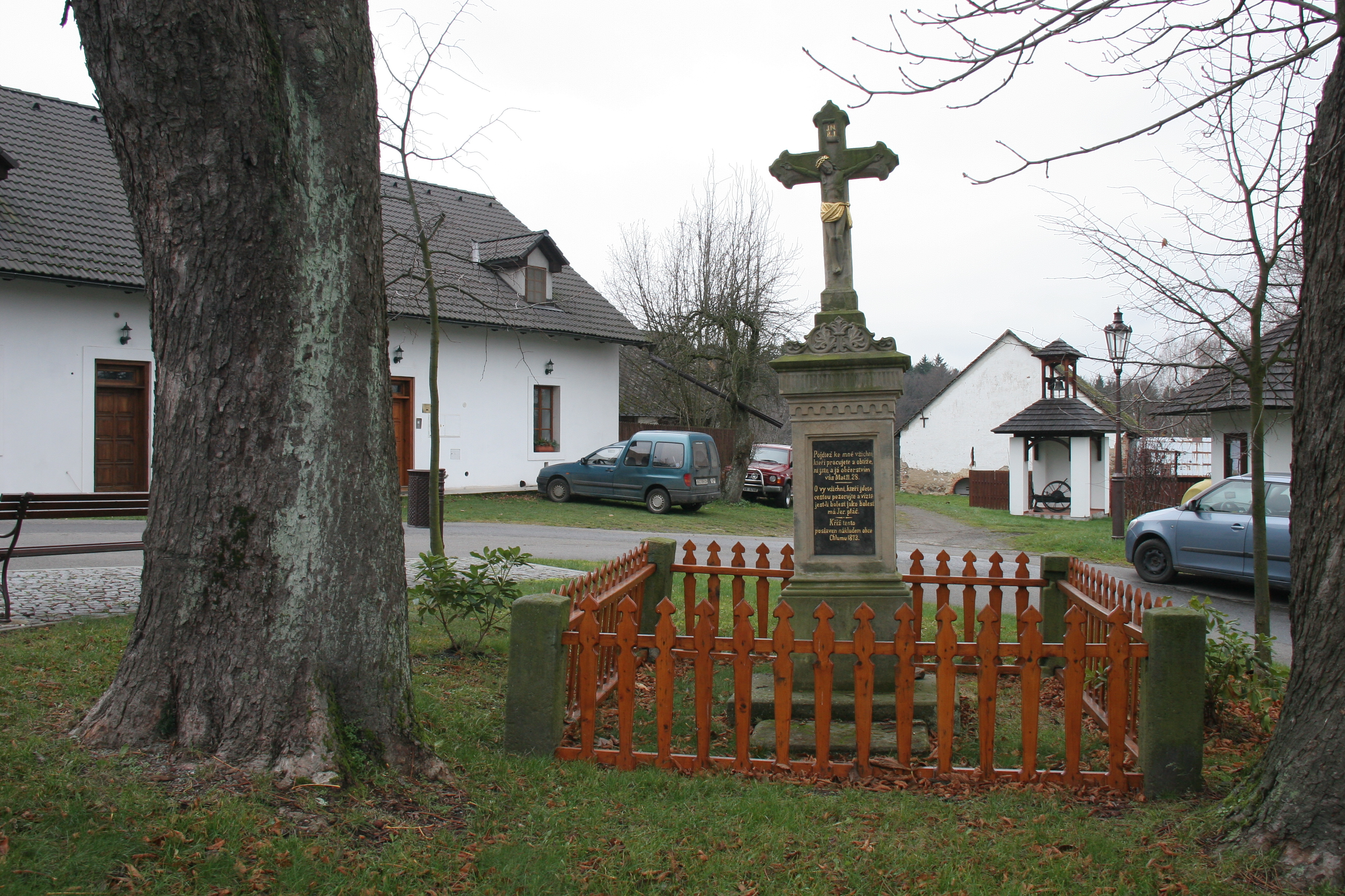 Chlum kříž